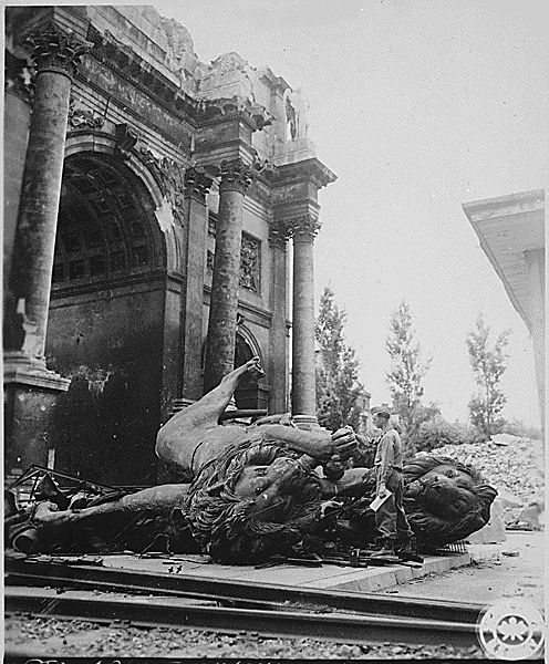 Siegestor in Munich after World War II